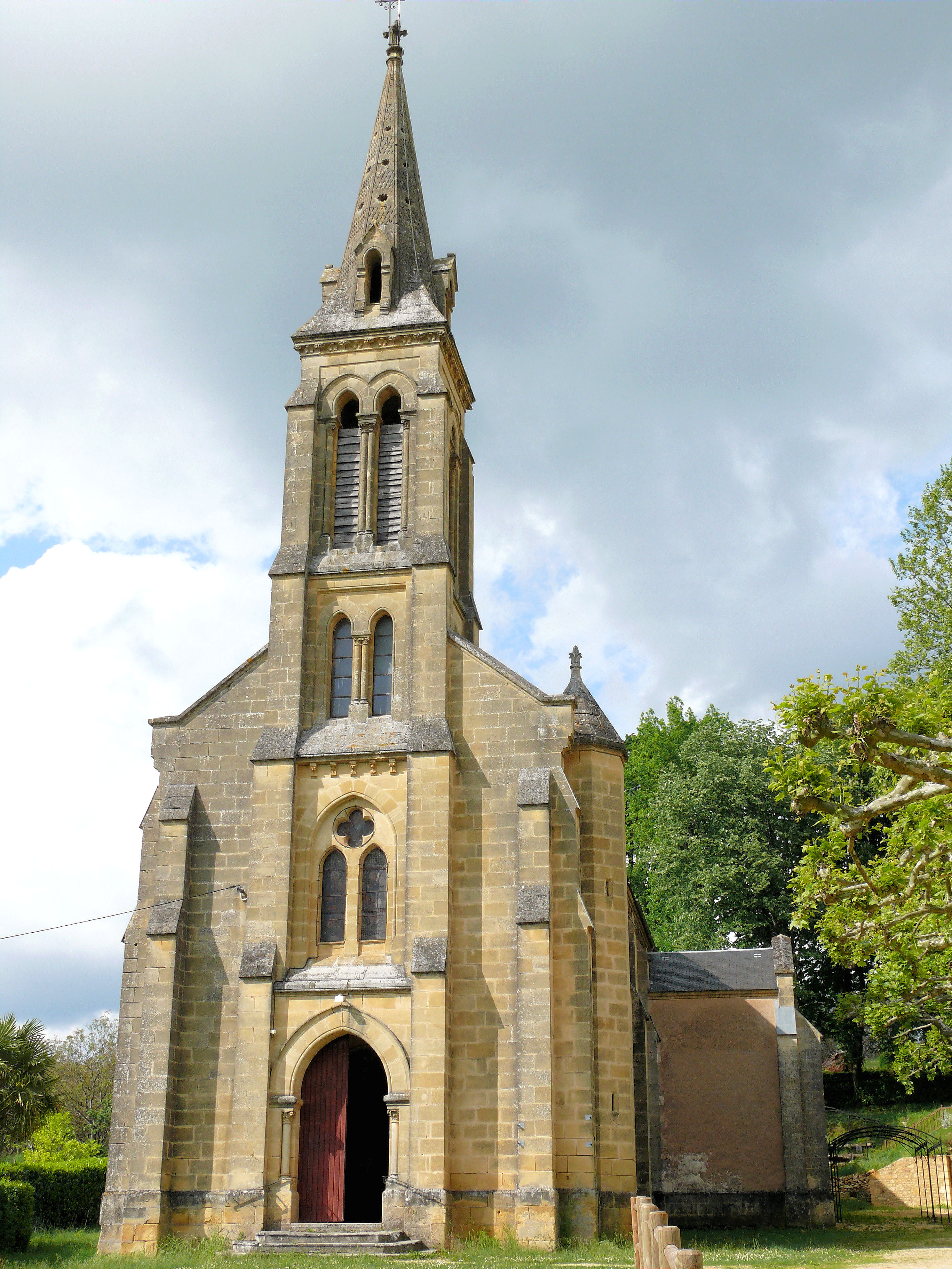 Belvès - Chapelle Notre-Dame de Capelou